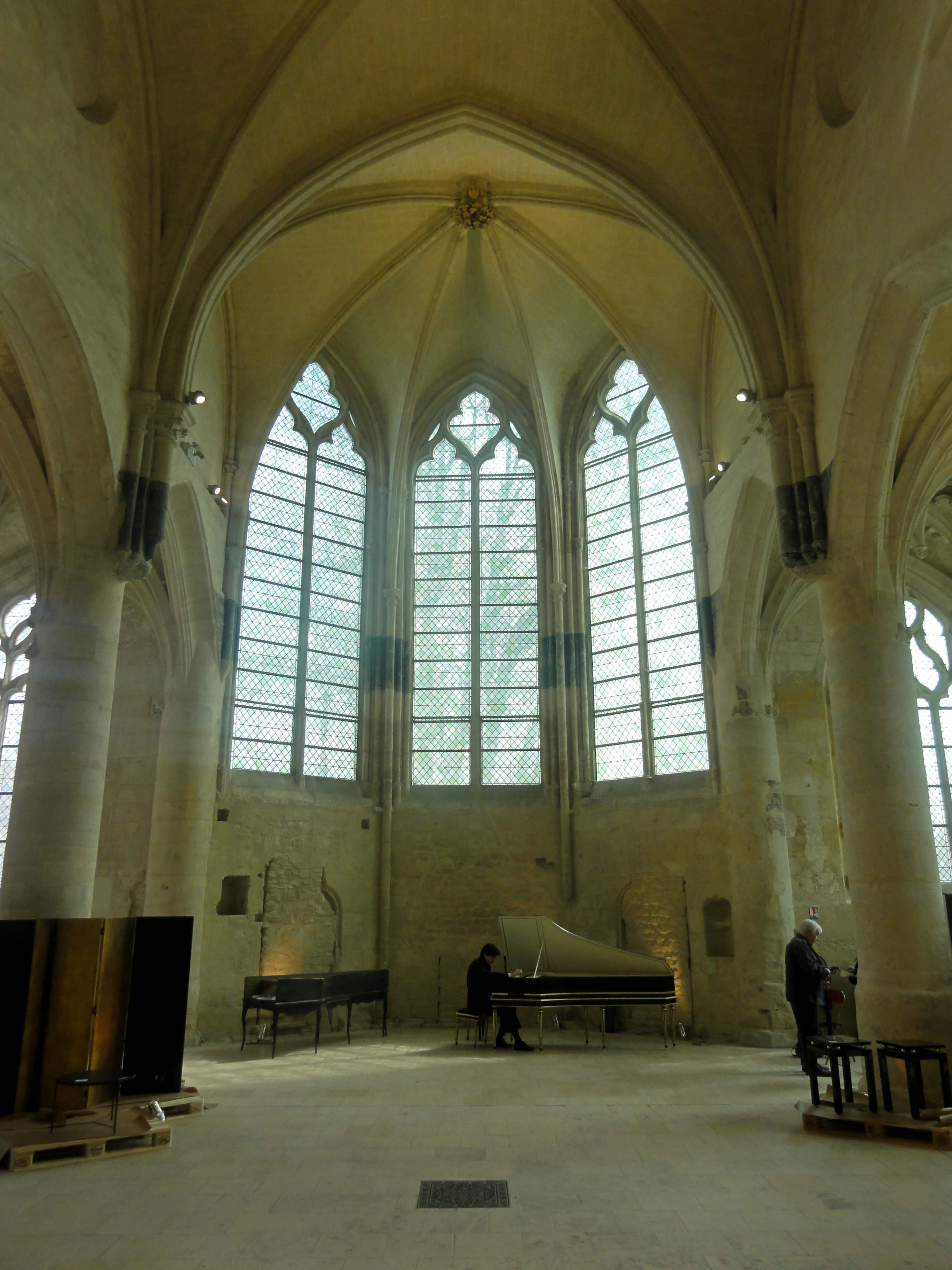 Intérieur de l'église - voir titre.